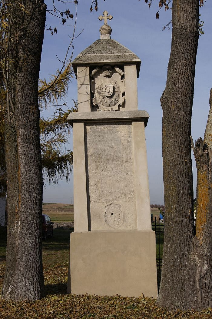 Włochy - pomnik wystawiony w 1609 r. ku czci Zygmunta Gonzagi Myszkowskiego